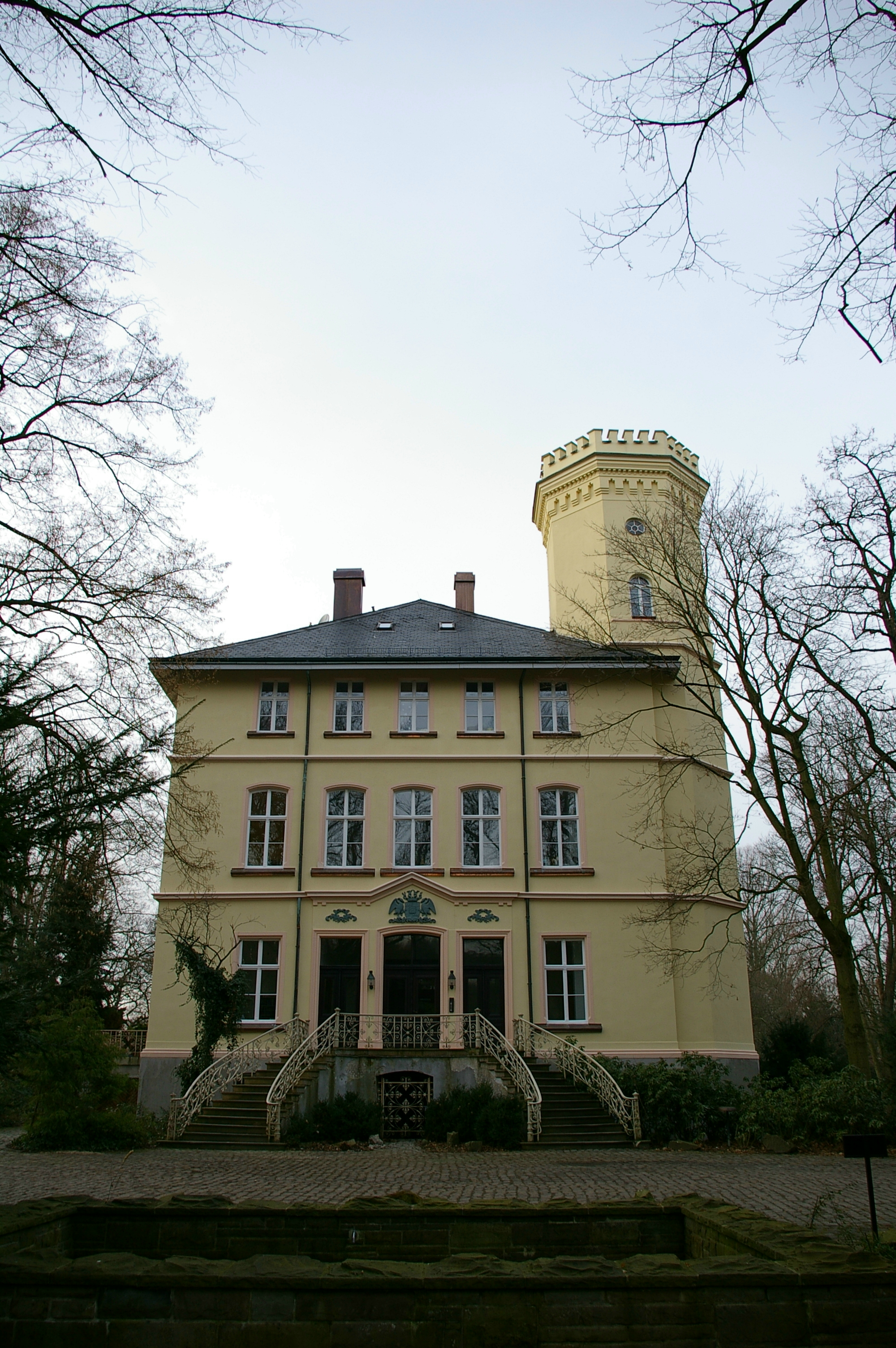 Schloss Schwanbell in Lünen